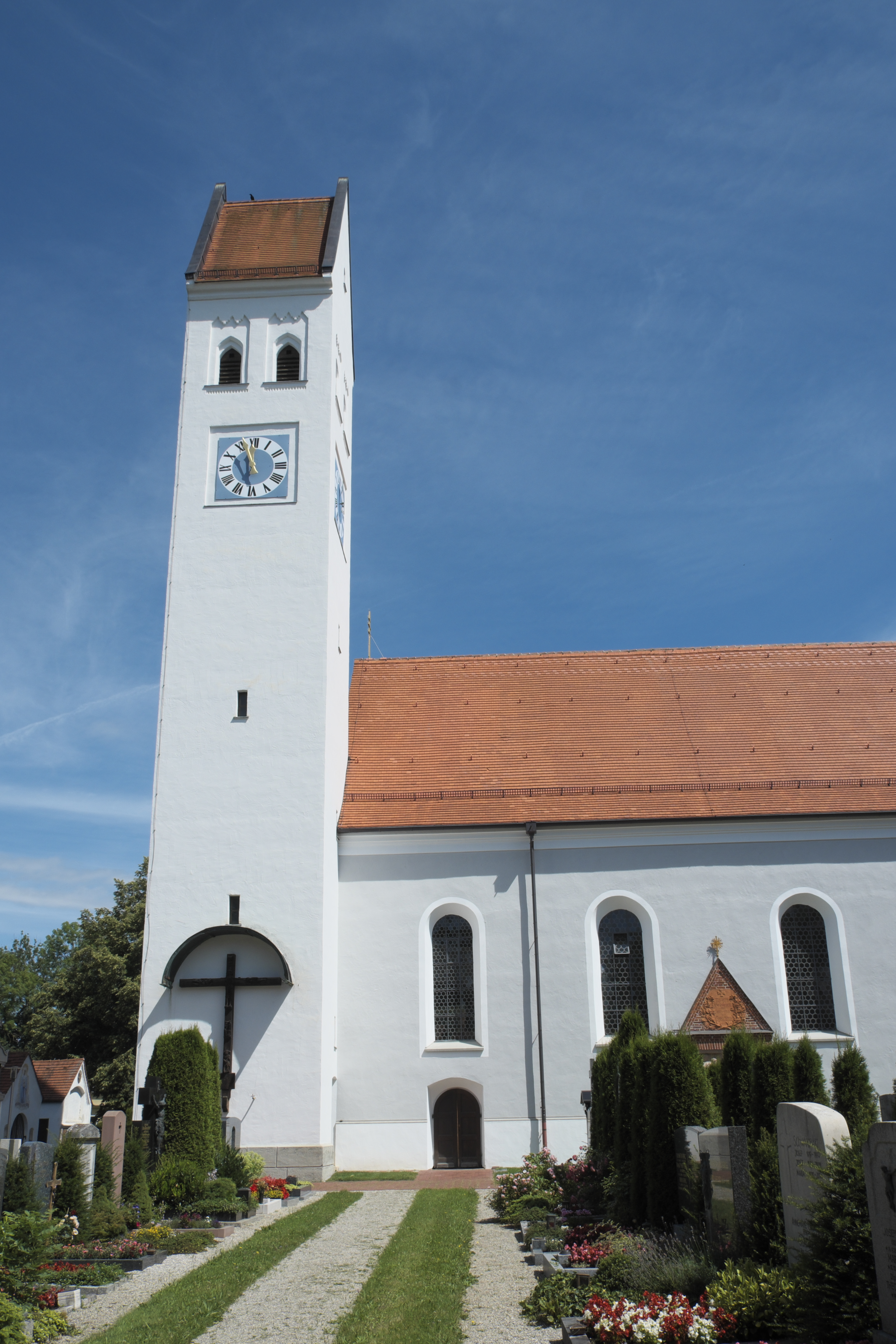 Katholische Pfarrkirche St. Lorenz in Oberföhring im Stadtbezirk Bogenhausen in München (Bayern/Deutschland)